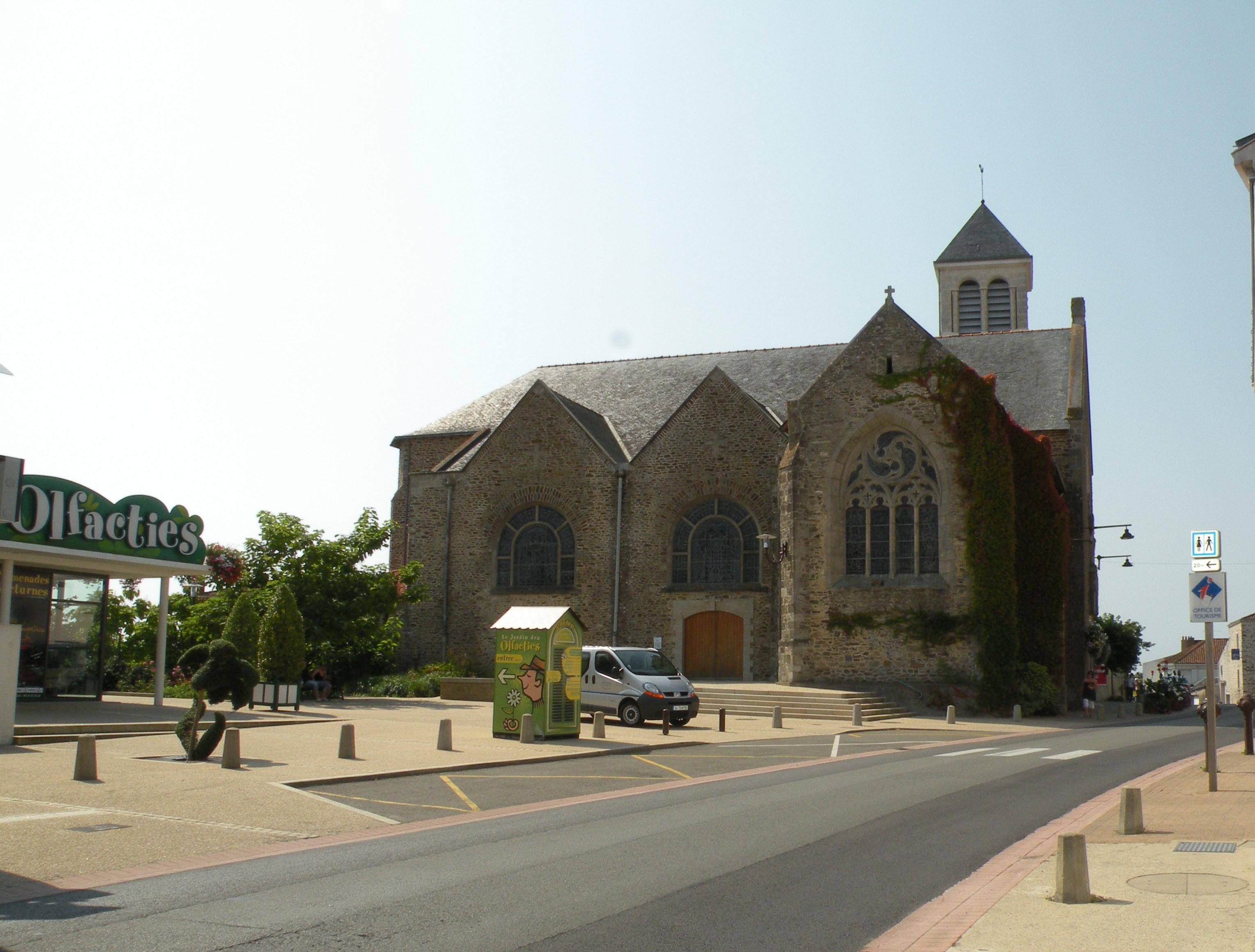 eglise de Coëx